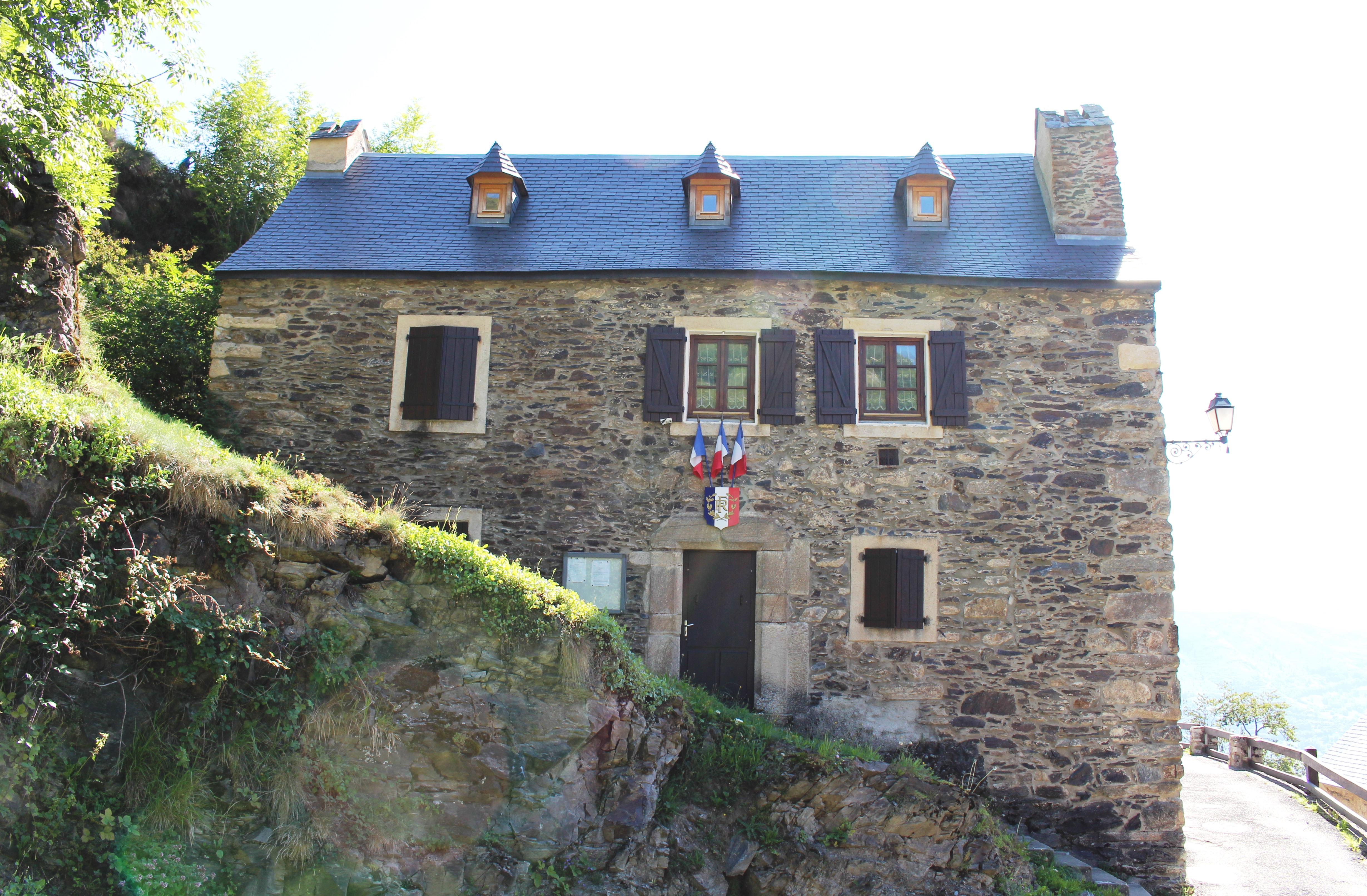 Mairie de Saint-Lary-Soulan (Hautes-Pyrénées)